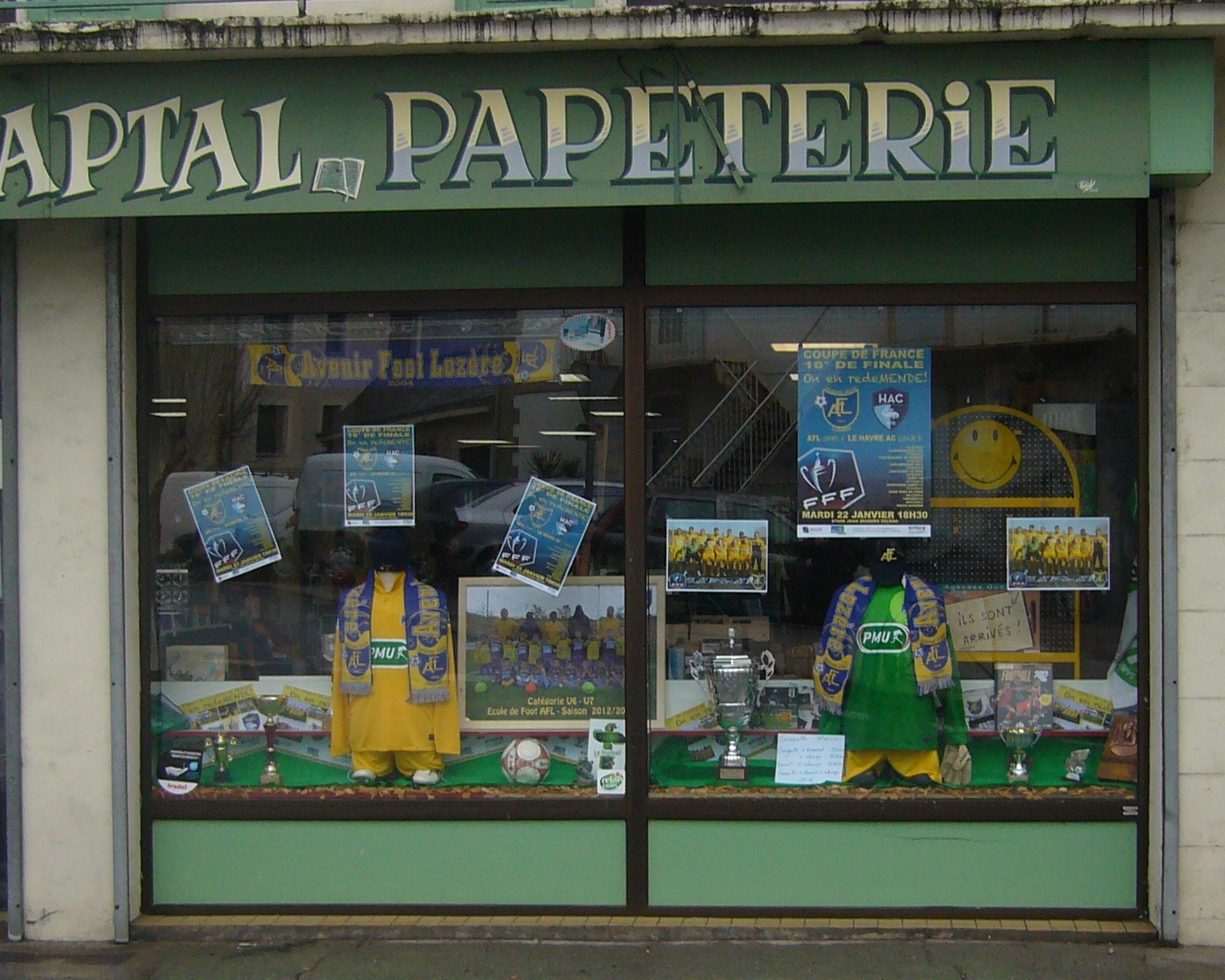 Une librairie à Mende (Lozère, France), décorée aux couleurs du club de football local (Avenir Foot Lozère), avant le 16e de finale de la Coupe de France 2013